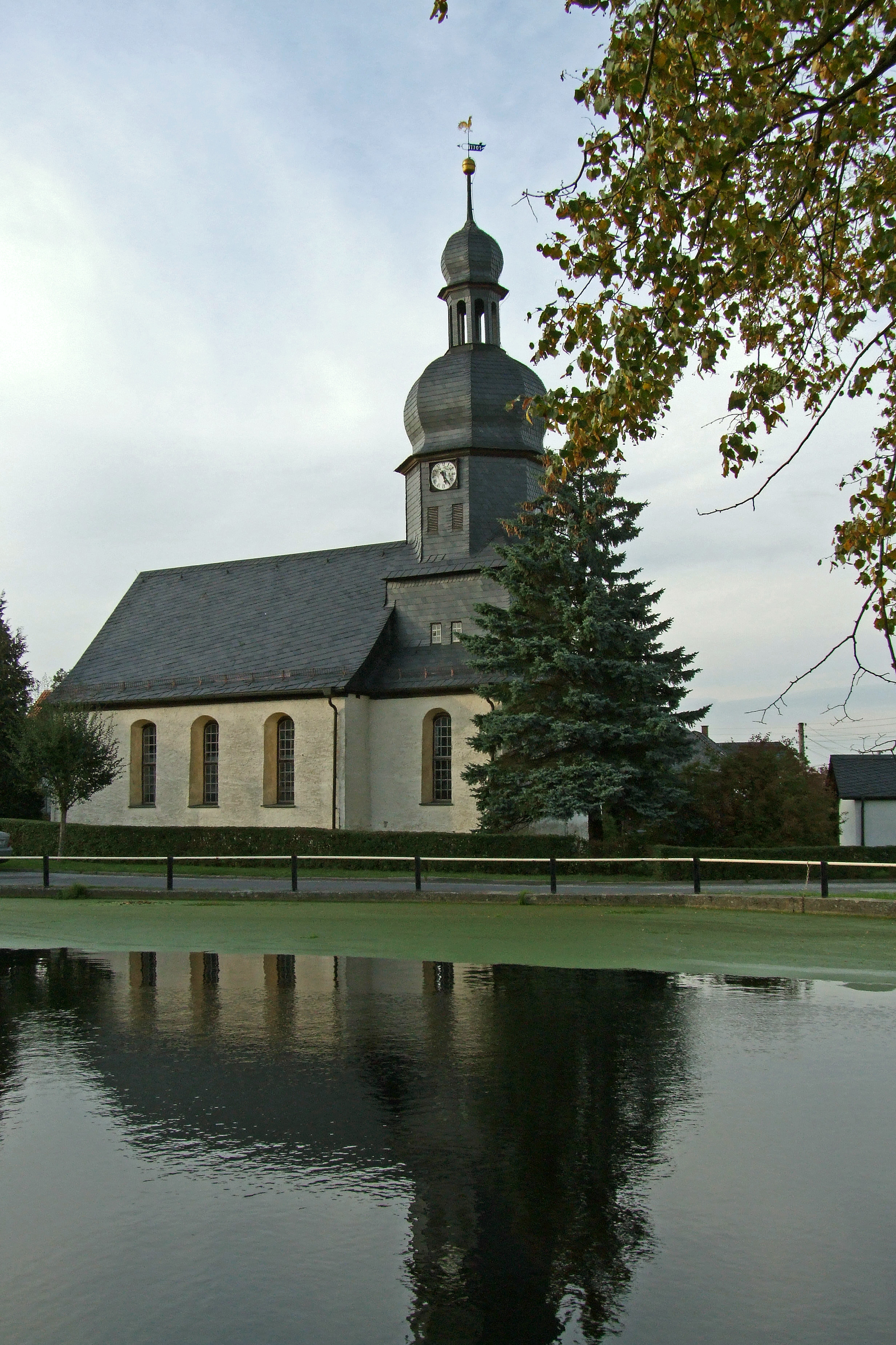 Kirche Lothra